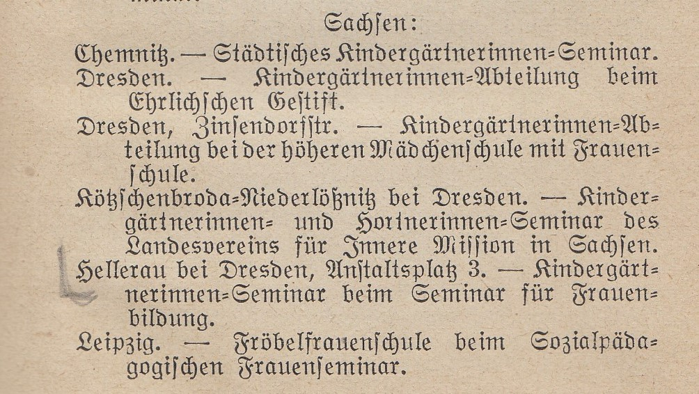 Liste der Kindergärtnerinnenseminare in Sachsen